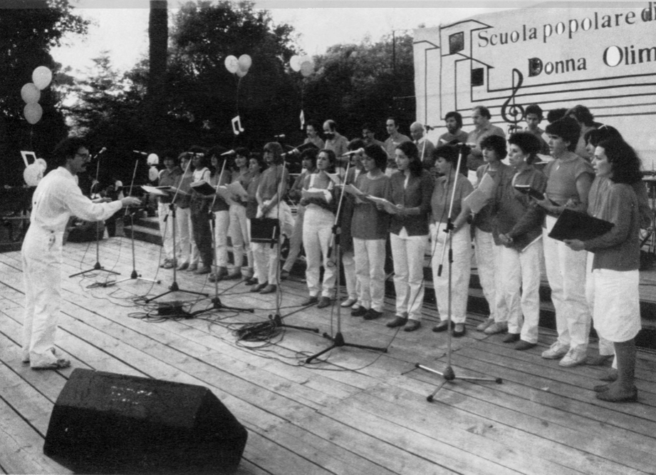 Festa di fine anno della Scuola Popolare di Musica Donna Olimpia giugno 1983